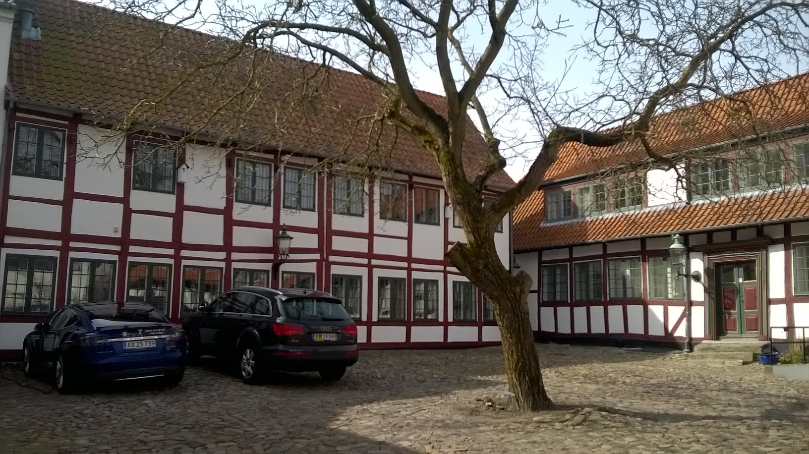 Apotekergården bag Næstved Løve Apotek.